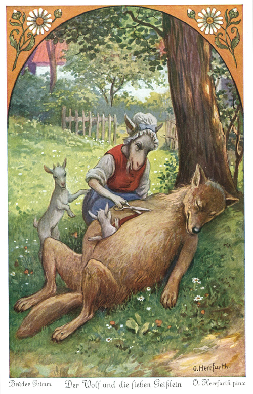 Der Wolf und die sieben Geißlein. Postkartenserie nach dem Märchen. Serie von sechs Postkarten der Firma Uvachrom. Serie 265, Nr. 4520 Text der Rückseite: Die alte Geiß schnitt nun mit einer Schere dem bösen Wolf den Bauch auf und alle sechs Geißlein kamen munter an's Tageslicht. Dem Ungetüm aber füllten sie den Leib mit Steinen und nähten ihn wieder zu. Der schlafende Wolf merkte nichts davon.